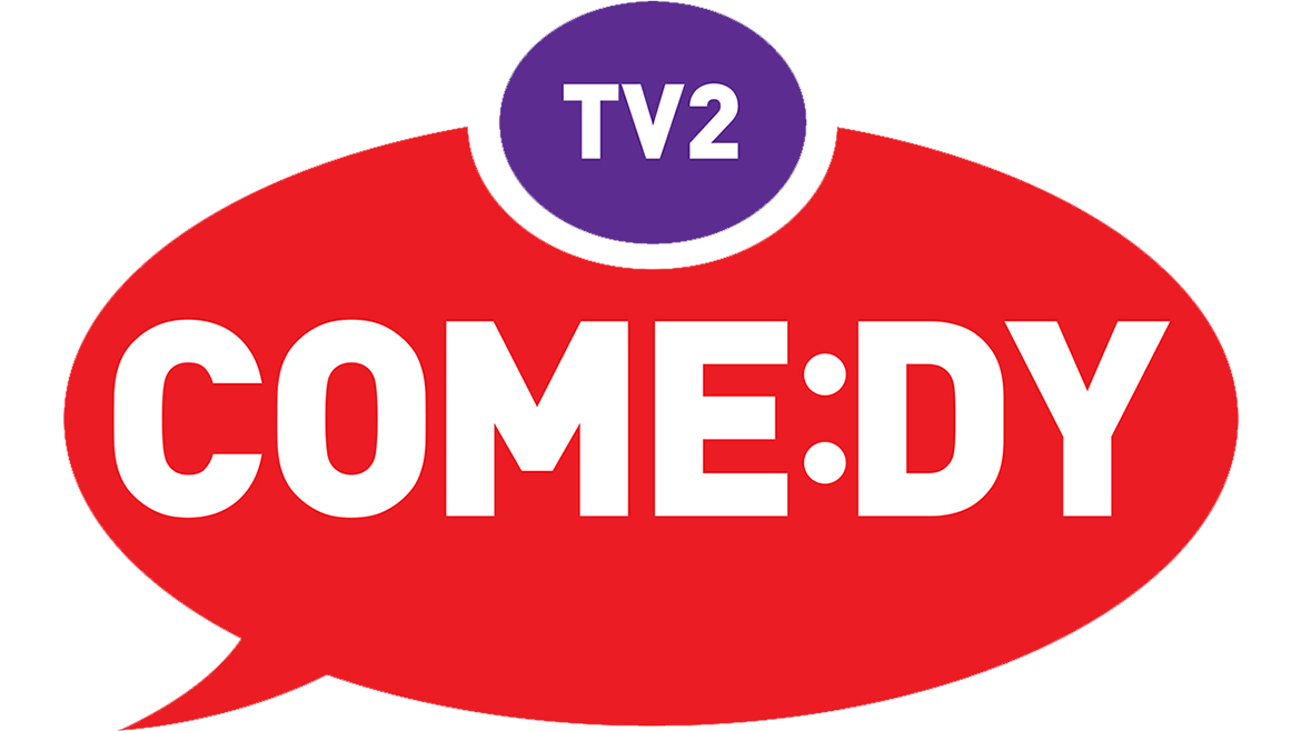 A csatorna logója TV2 Comedy-ként.